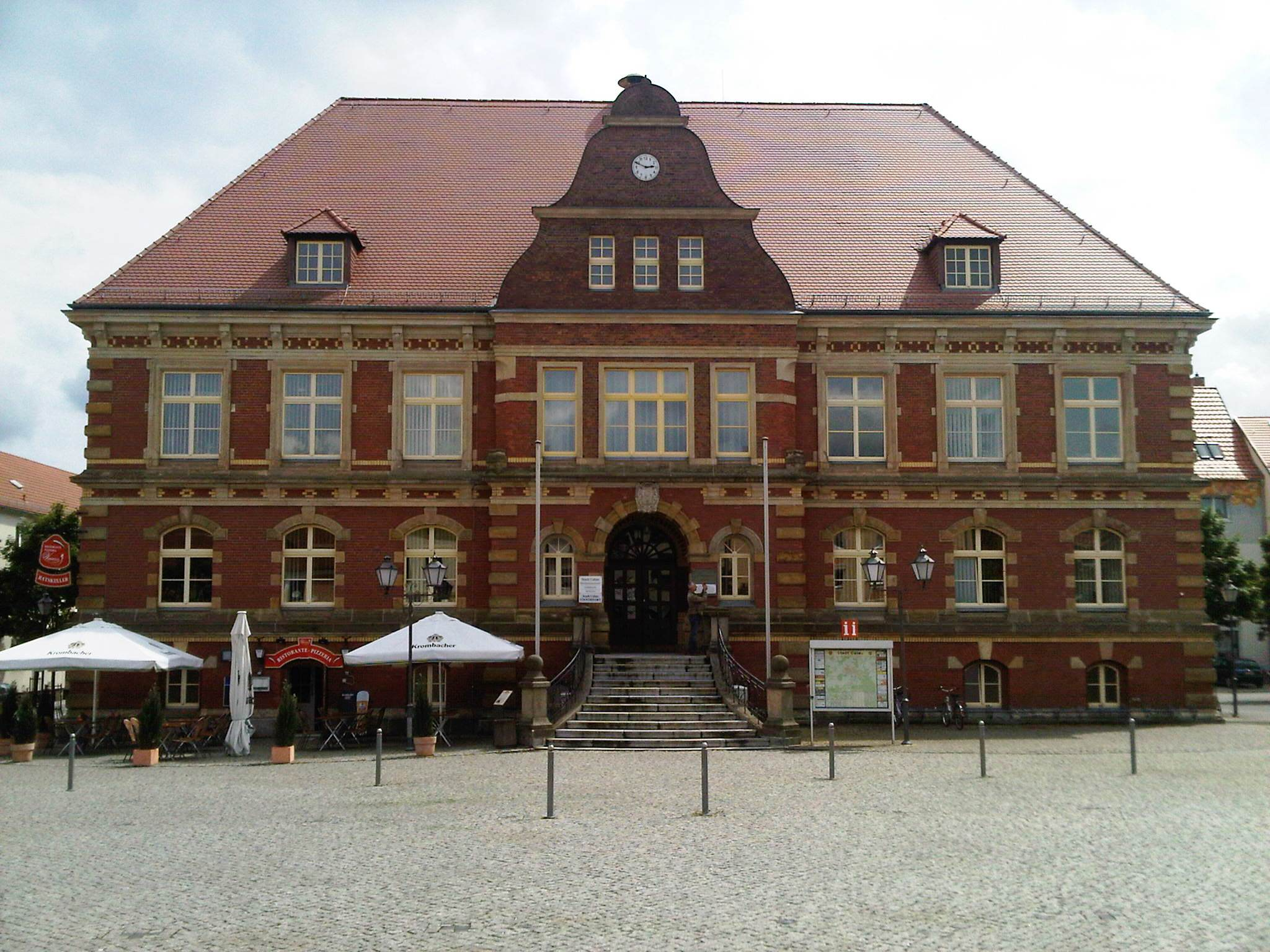 Rathaus Calau, Stadt im Landkreis Oberspree-Lausitz, Brandenburg